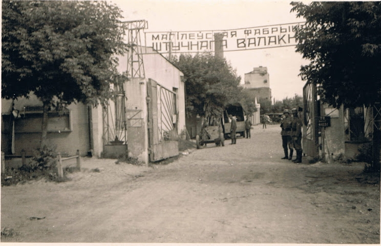 Магілёўская фабрыка штучнага валакна. 1941